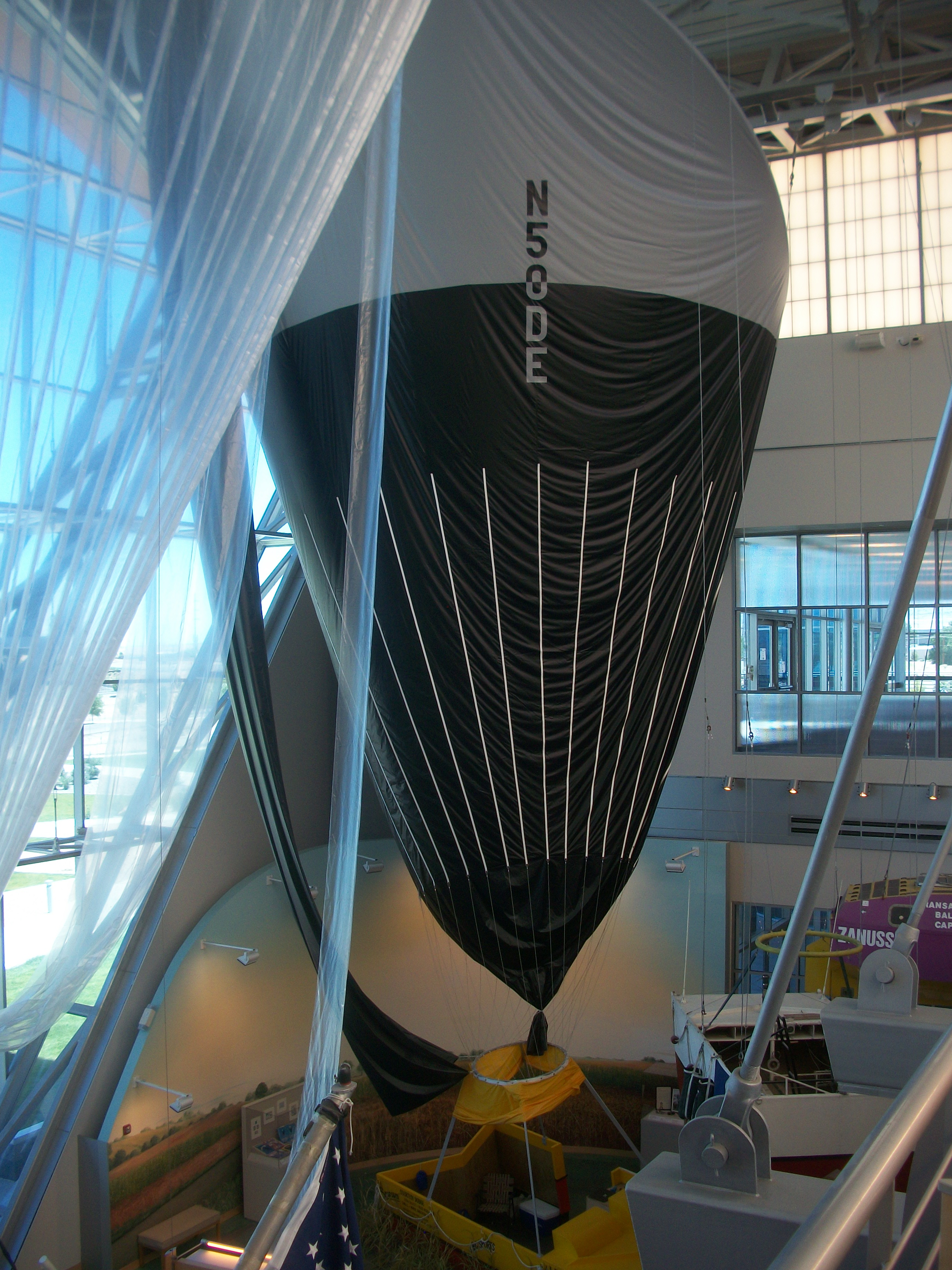 Interior exhibitions.; Anderson-Abruzzo Albuquerque International Balloon Museum